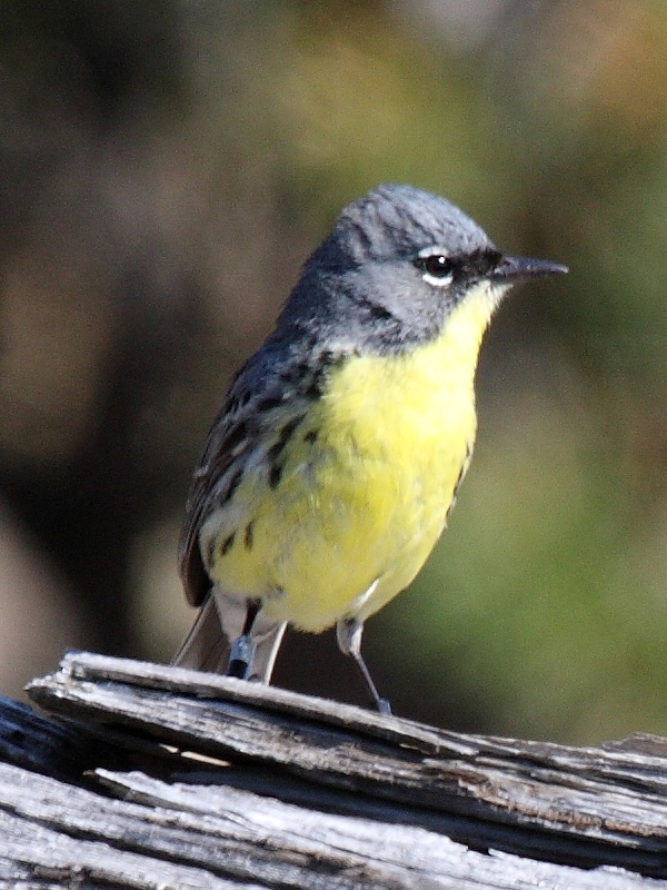 Kirtland's Warbler (Dendroica kirtlandii), male